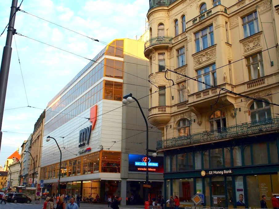 Obchodní dům Máj/MY